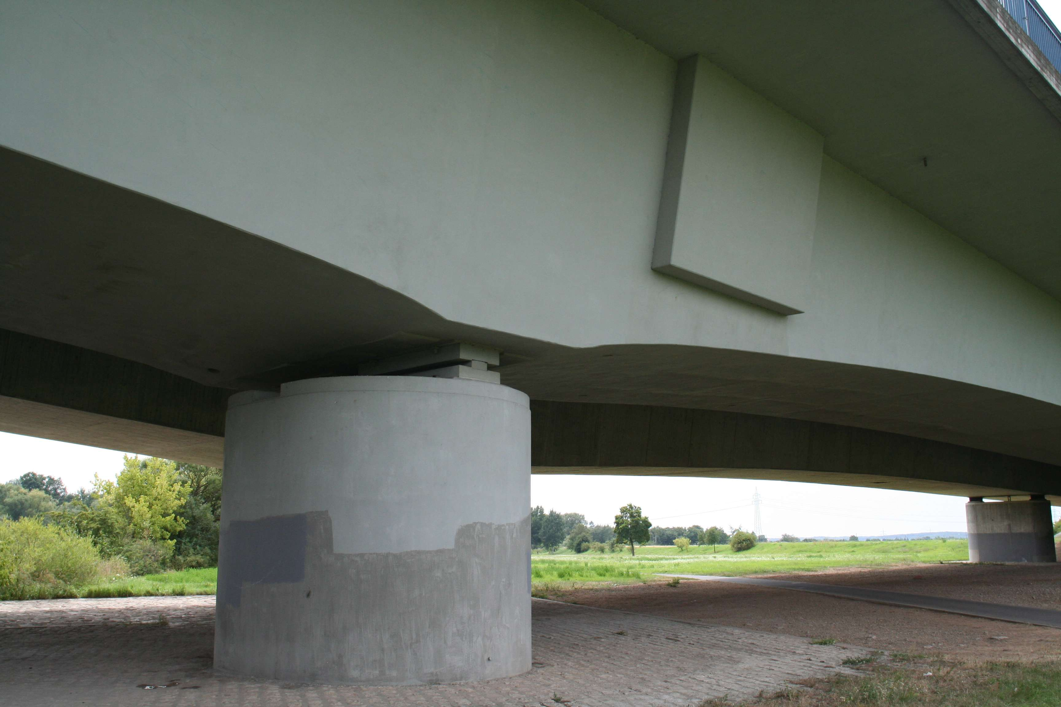 Mainbrücke Oberndorf bei Schweinfurt